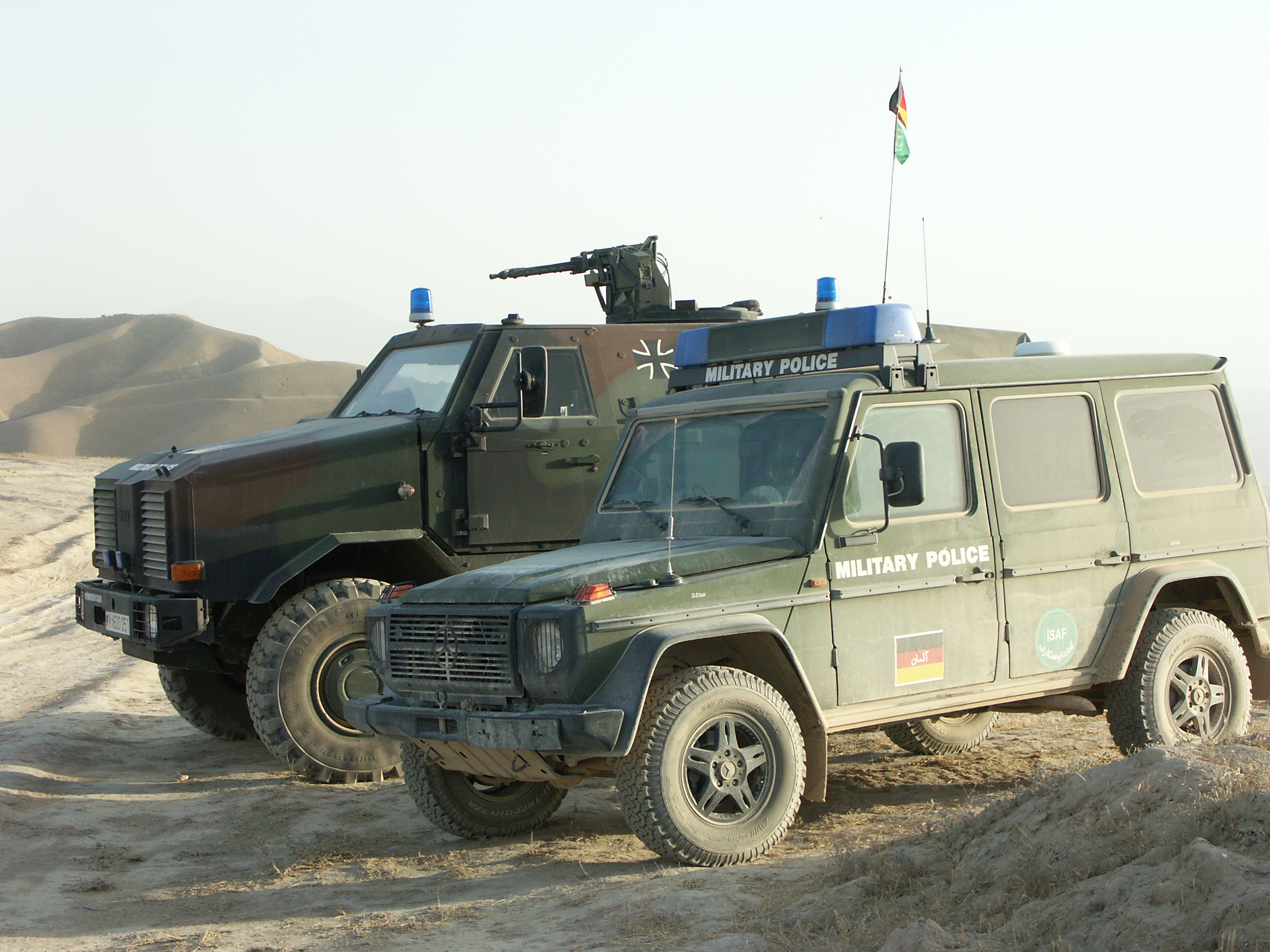 Einsatzfahrzeuge DINGO I und sondergeschützter "SSA" in Afghanistan